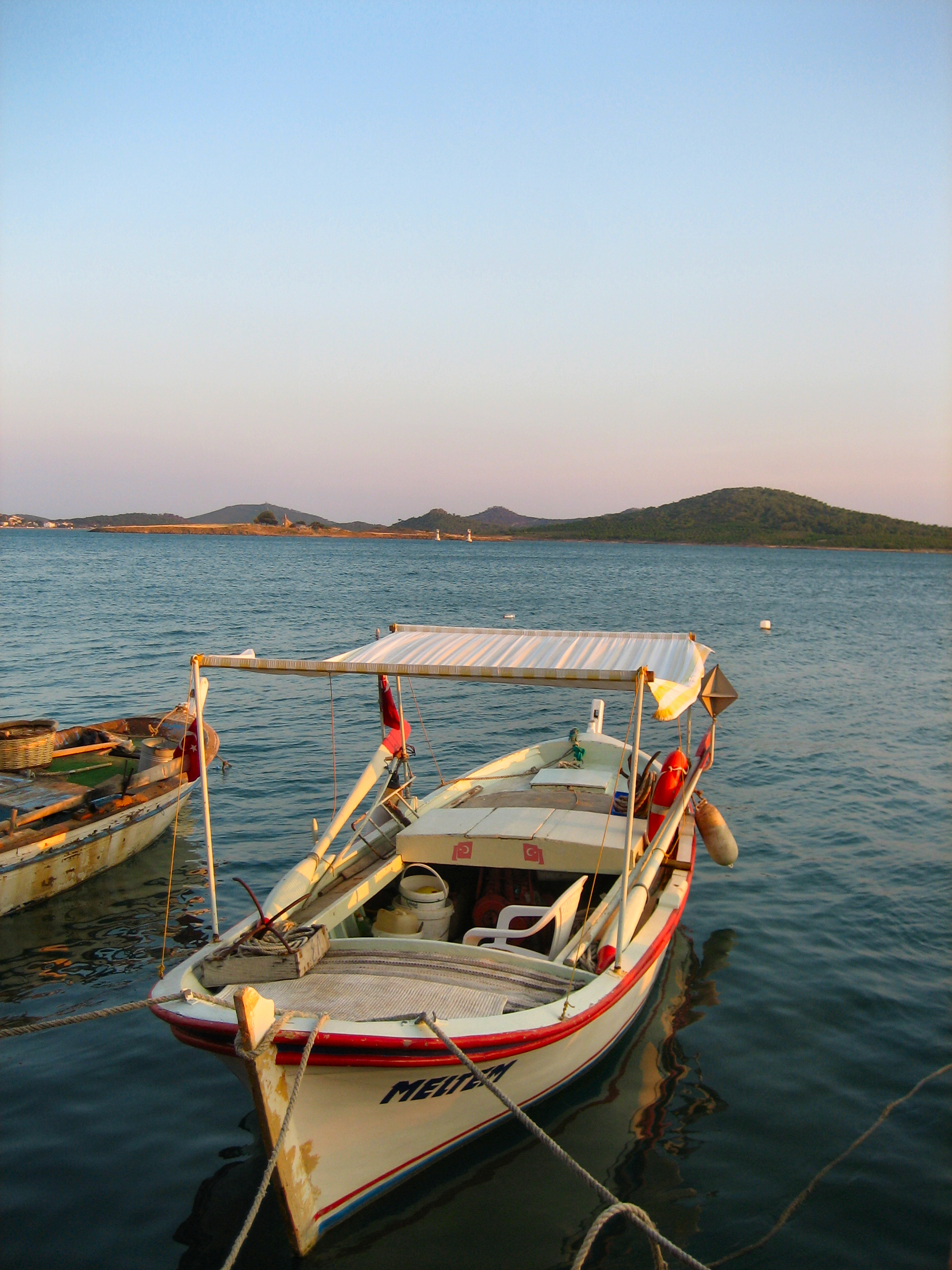 yazar: (kendisi)